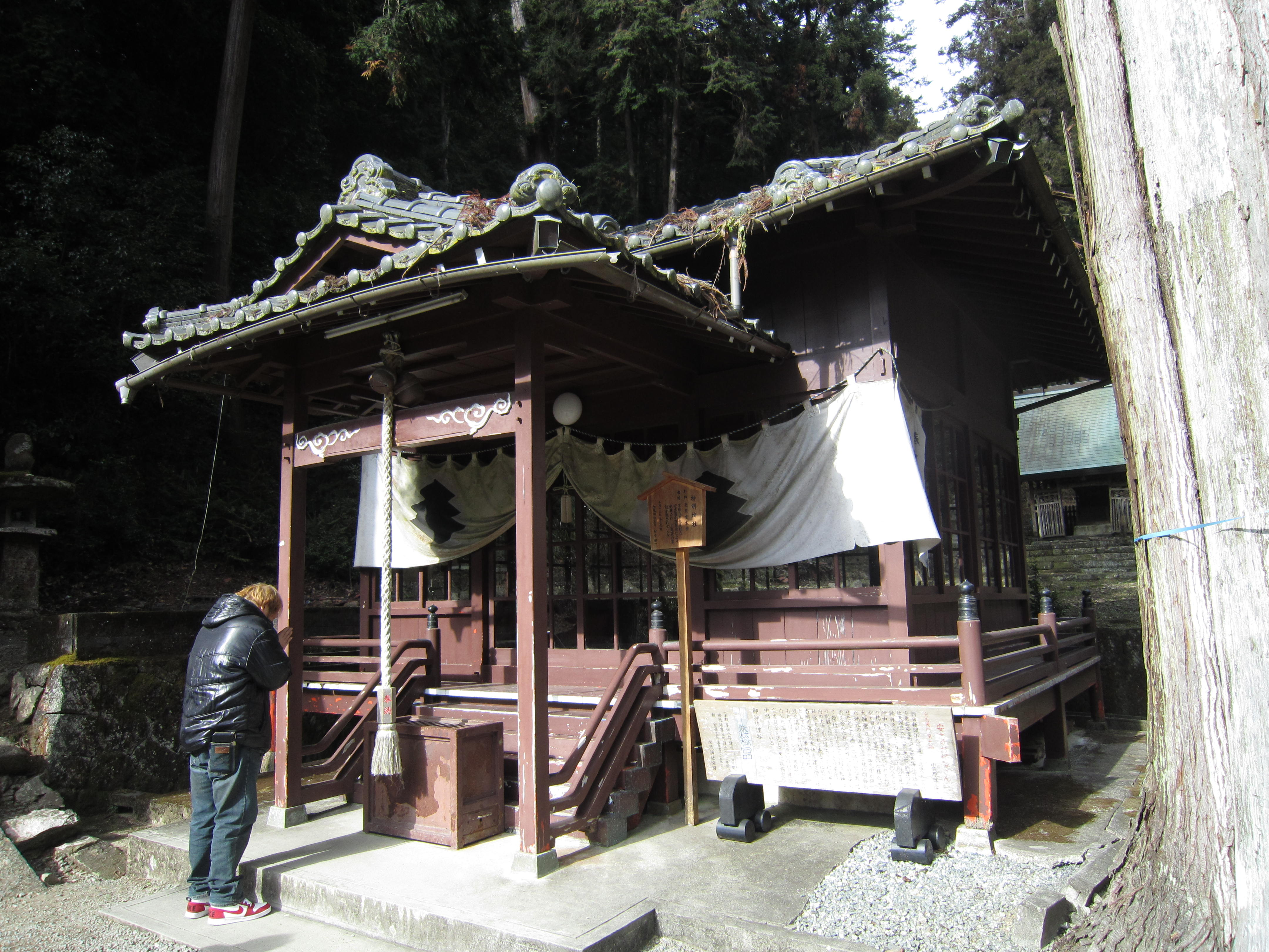 日本国兵庫県姫路市安富町にある安志稲荷神社・加茂神社。境内にある神明社拝殿と参拝する客。